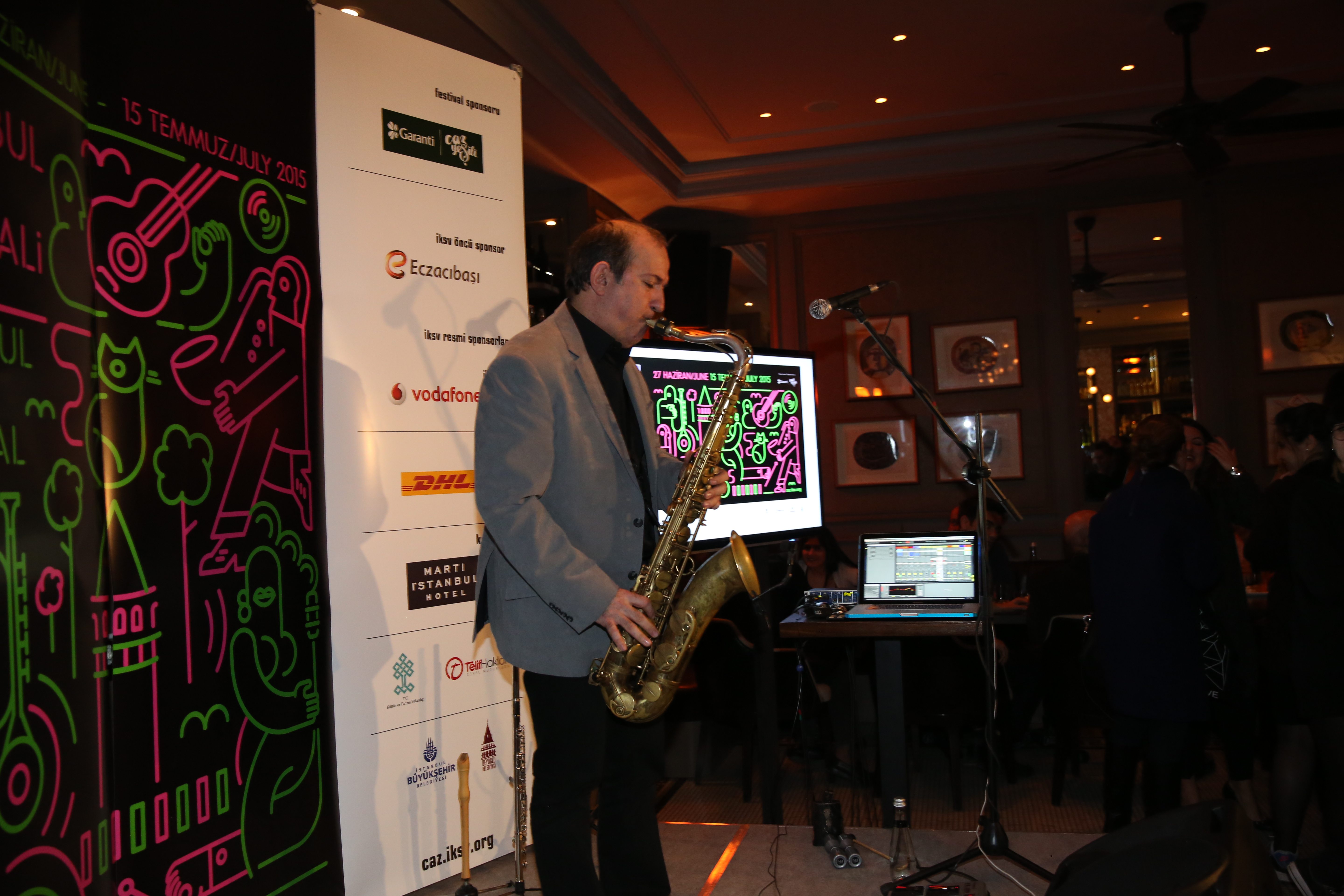 Caz müzisyeni